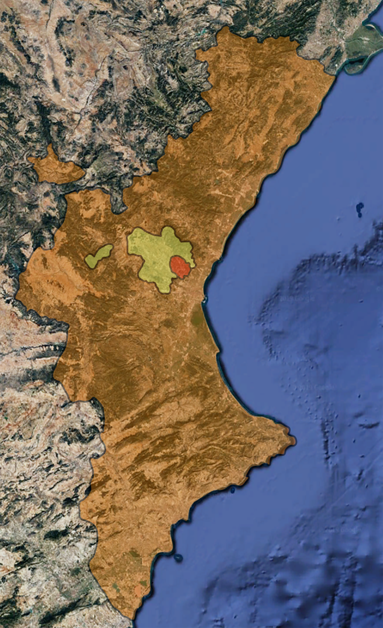 La imatge mostra la localització de Bétera al Camp de Túria. En taronja la Comunitat Valenciana, en vert el Camp del Turia, y en vermell Bétera.